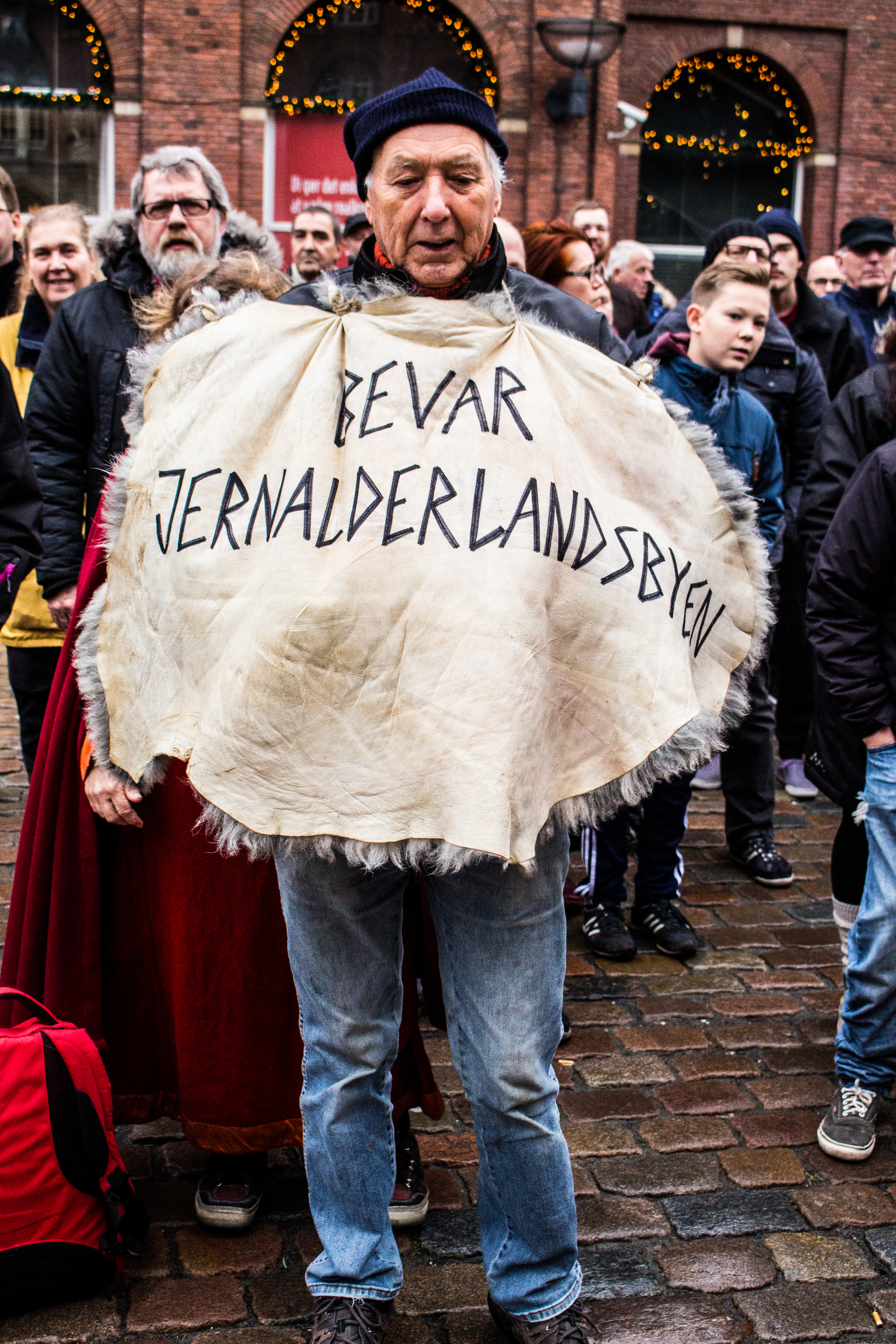 Demonstration for bevarelse af landsbyen